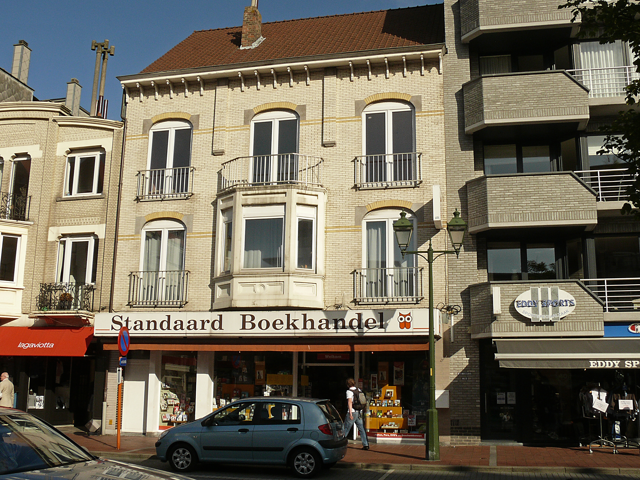 Classicerend breed appartementsgebouw van 3 bouwlagen met pannendak (1925/26). Gelijkvloers bevat Standaard Boekhandel